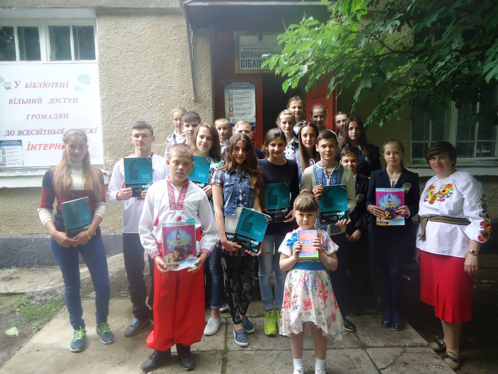 Юні читачі центральної районної бібліотеки прийняли участь в конкурсі знавців англійської мови